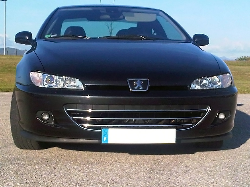 Bouclier avant de Peugeot 406 coupé phase 2